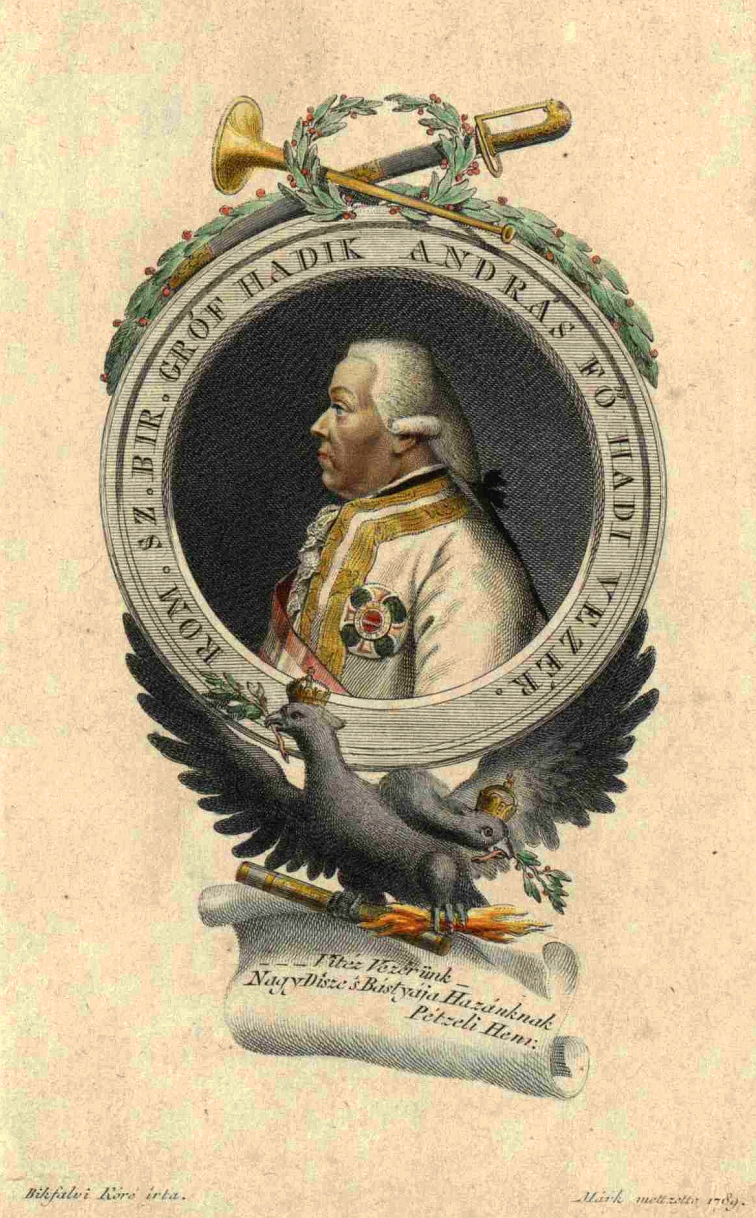 Gróf futaki Hadik András (németül: Andreas Reichsgraf Hadik von Futak; Csallóköz, 1710. október 16. – Bécs, 1790. március 12.) magyar huszártábornok, császári tábornagy (Feldmarschall)